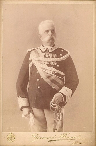 Carlo Brogi (1850-1925) - Il re Umberto I nel 1895.